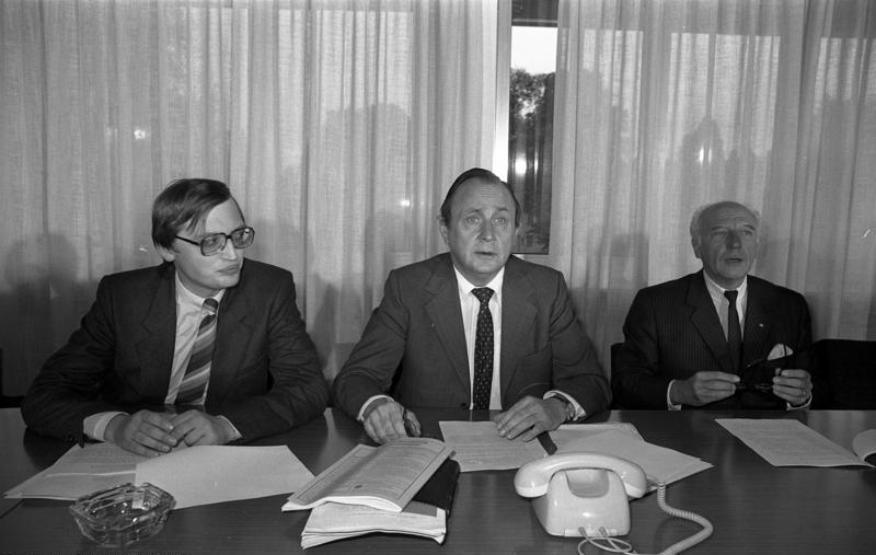 Sitzung des Bundesvorstandes der F.D.P. im Bundeshaus